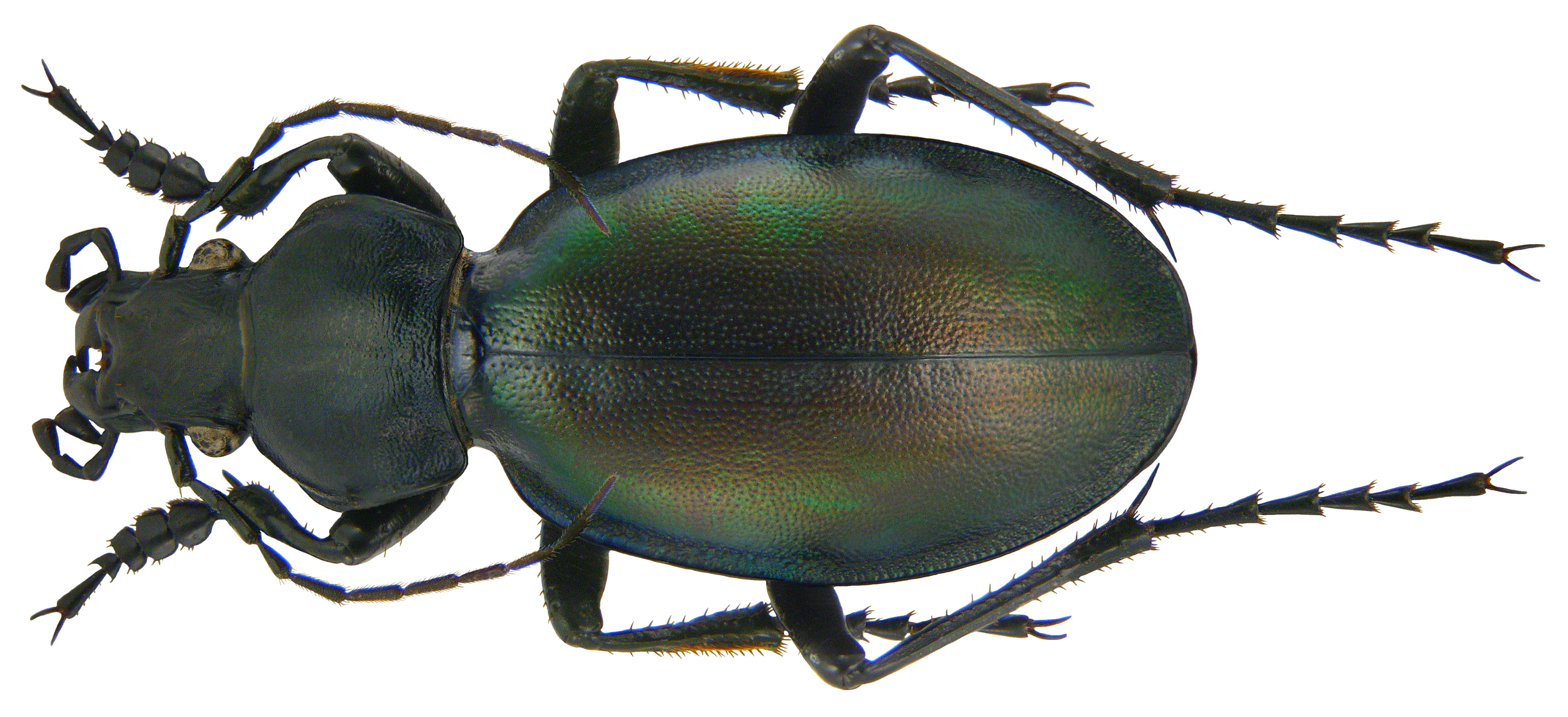 Familie: Carabidae Grösse: 29 mm Fundort: Türkei, Cankiri, Cerkes, Kurtcimeni leg. det. K.Staven, 1989 Foto: U.Schmidt, 2009